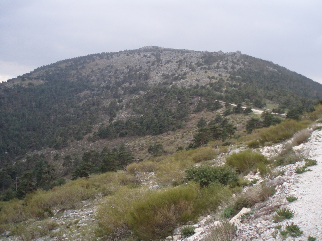 Vertiente noreste de Cabeza Lijar (1.824 m), pico de la Sierra de Guadarrama (centro de España).